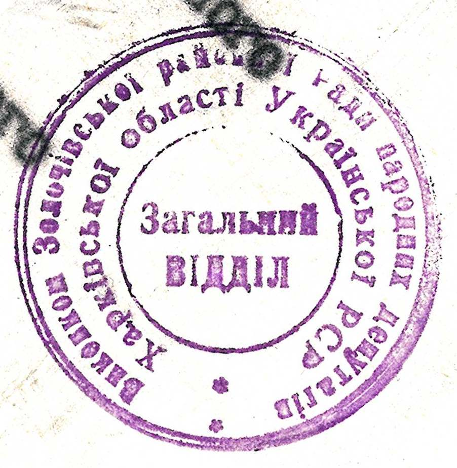 Печать исполнительного комитета Золочевского районного Совета народных депутатов УССР, Харьковская область. СССР. На украинском языке.